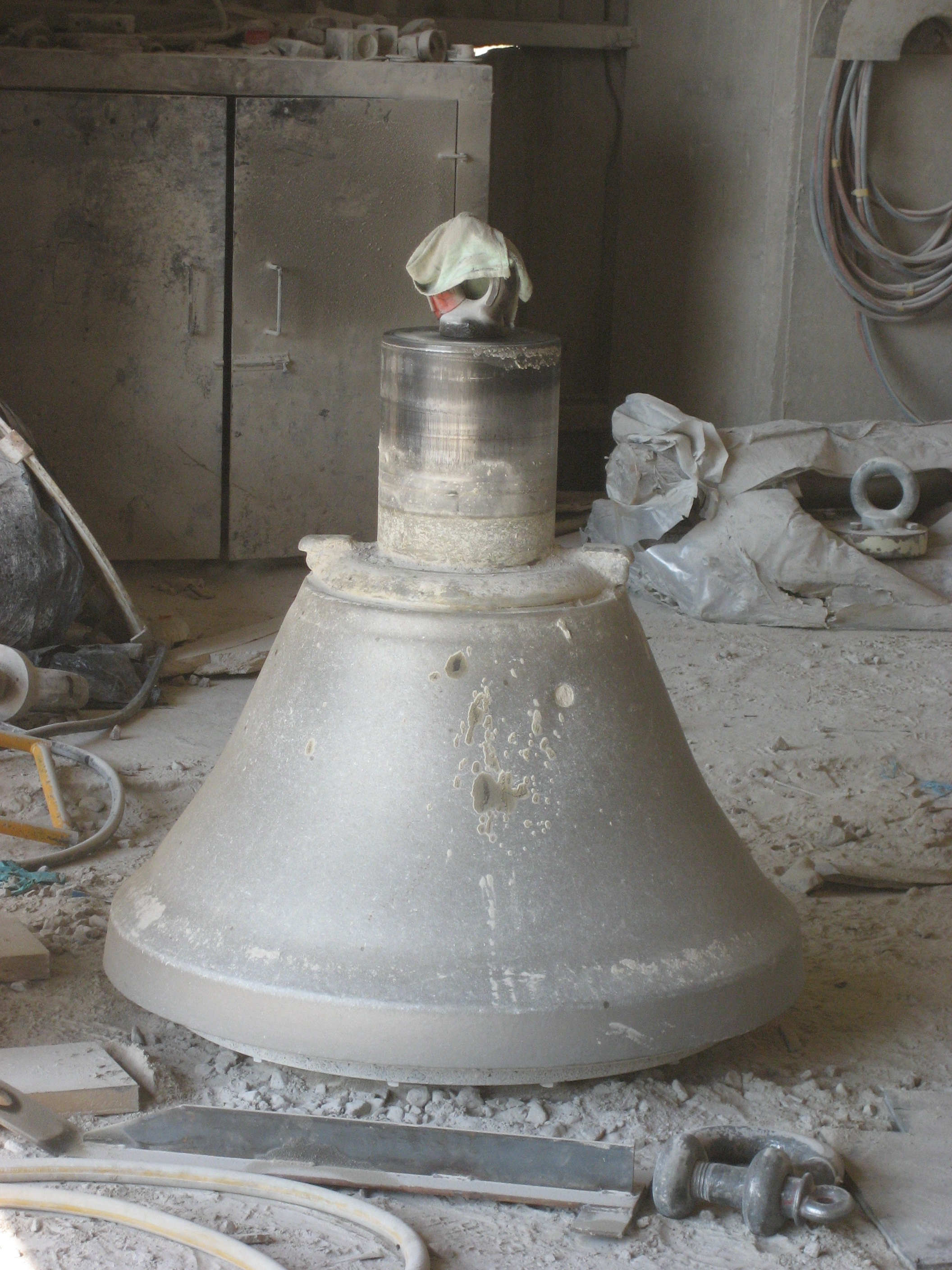 Brecherkegel eines Svedala H4000 Kegelbrechers im Granitsteinbruch Glensanda/Schottland